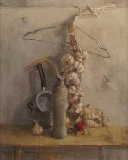 Stanisław Mazuś "Dominacja", 81x65 cm, 2012